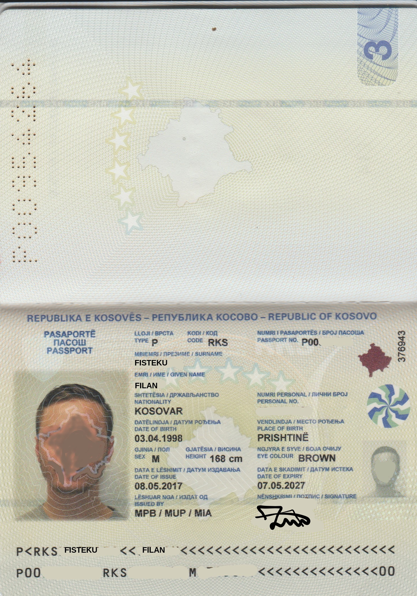 Kjo eshte passaporta me e fundit e Republikes se Kosoves.